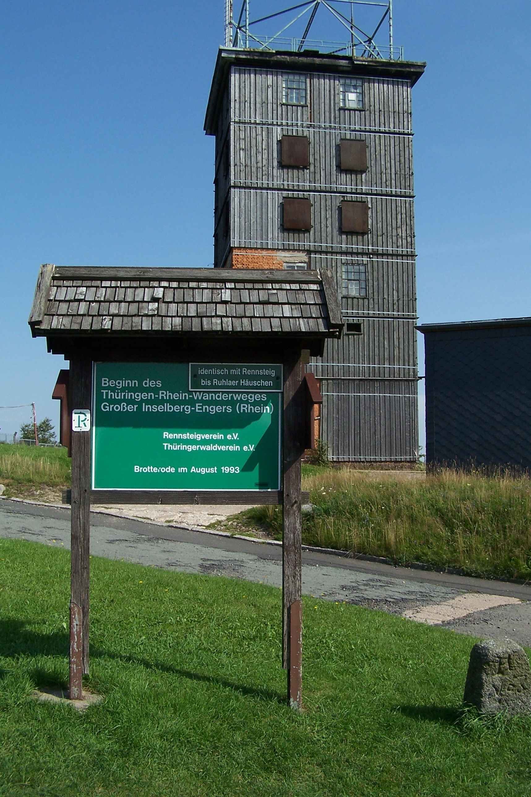 Am Beginn des (weniger bekannten) Wanderweges vom Inselsberg zum Rhein.